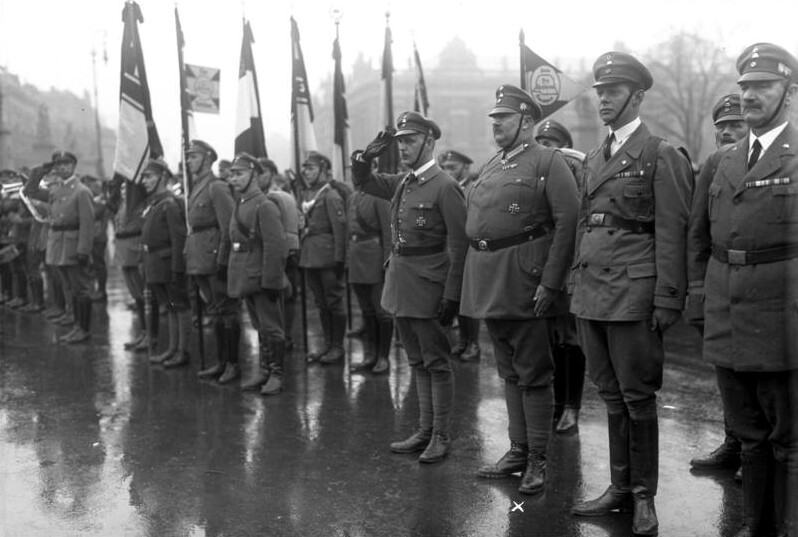 Der grosse Stahlhelmaufmarsch als Auftakt für das Volksbegehren im Lustgarten in Berlin! Prinz Eitel-Friedrich (x) der Sohn des Exkaisers in Reih und Glied der Stahlhelmer.